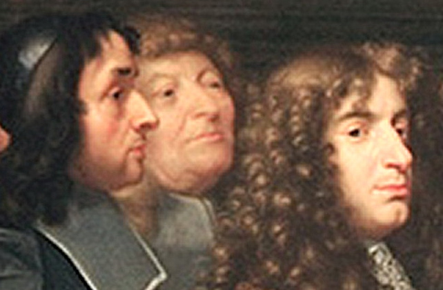 Portraits probables de Picard , La Hire, G.-D. Cassini ; extrait d'une toile d'Henri Testelin.